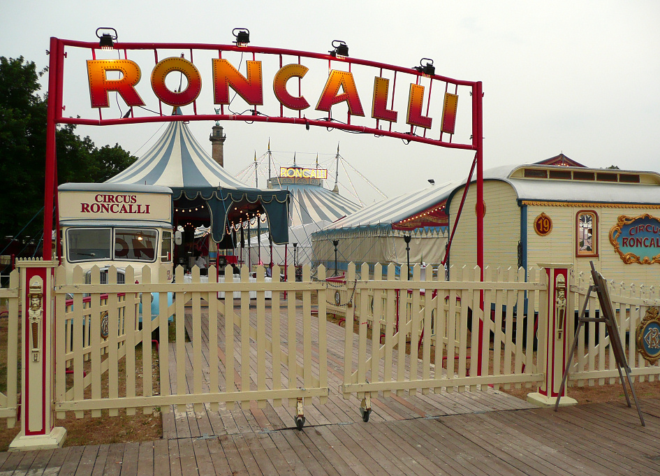 Roncalli Tor